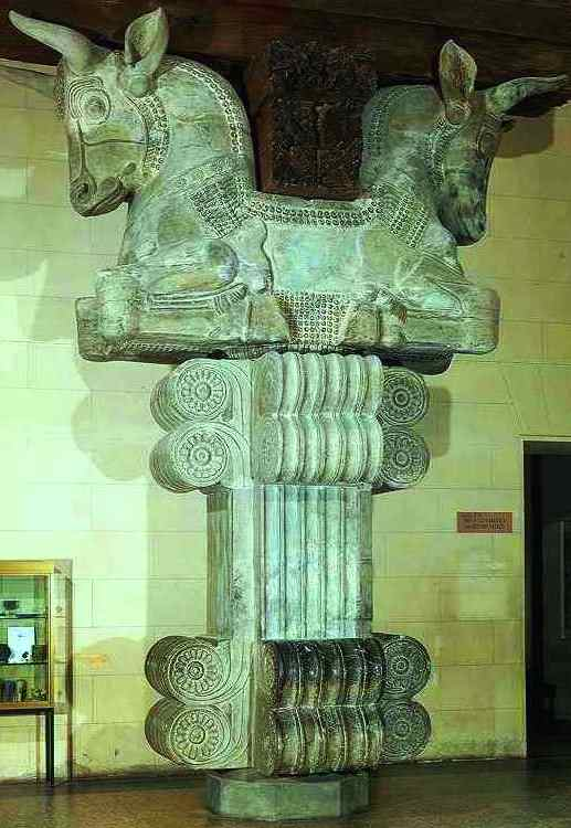 سرستون اصلی تالار ملاقات کاخ داریوش بزرگ